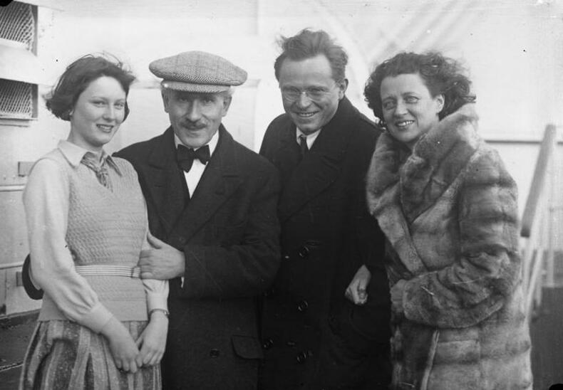 Arthuro Toscanini, der berühmte Dirigent der Mailänder Scala und der bekannte Prof. der Musik Adolf Busch kehren nach erfolgreicher Amerika-Turneè auf dem Dampfer "Albert Ballin" nach Europa zurück.Von links nach rechts: die Tochter Prof. Busch's, Toscanini, Prof. Busch, Frau Prof. Busch während der Überfahrt.